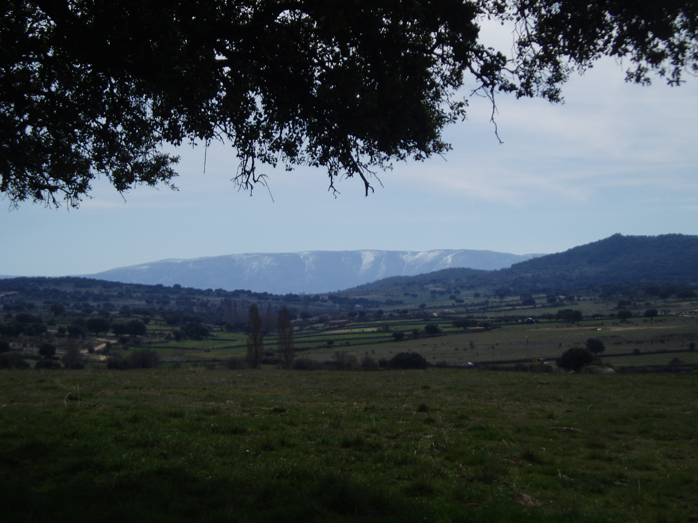 Penillanura poligénica junto a las estrivaciones del Sistema Central